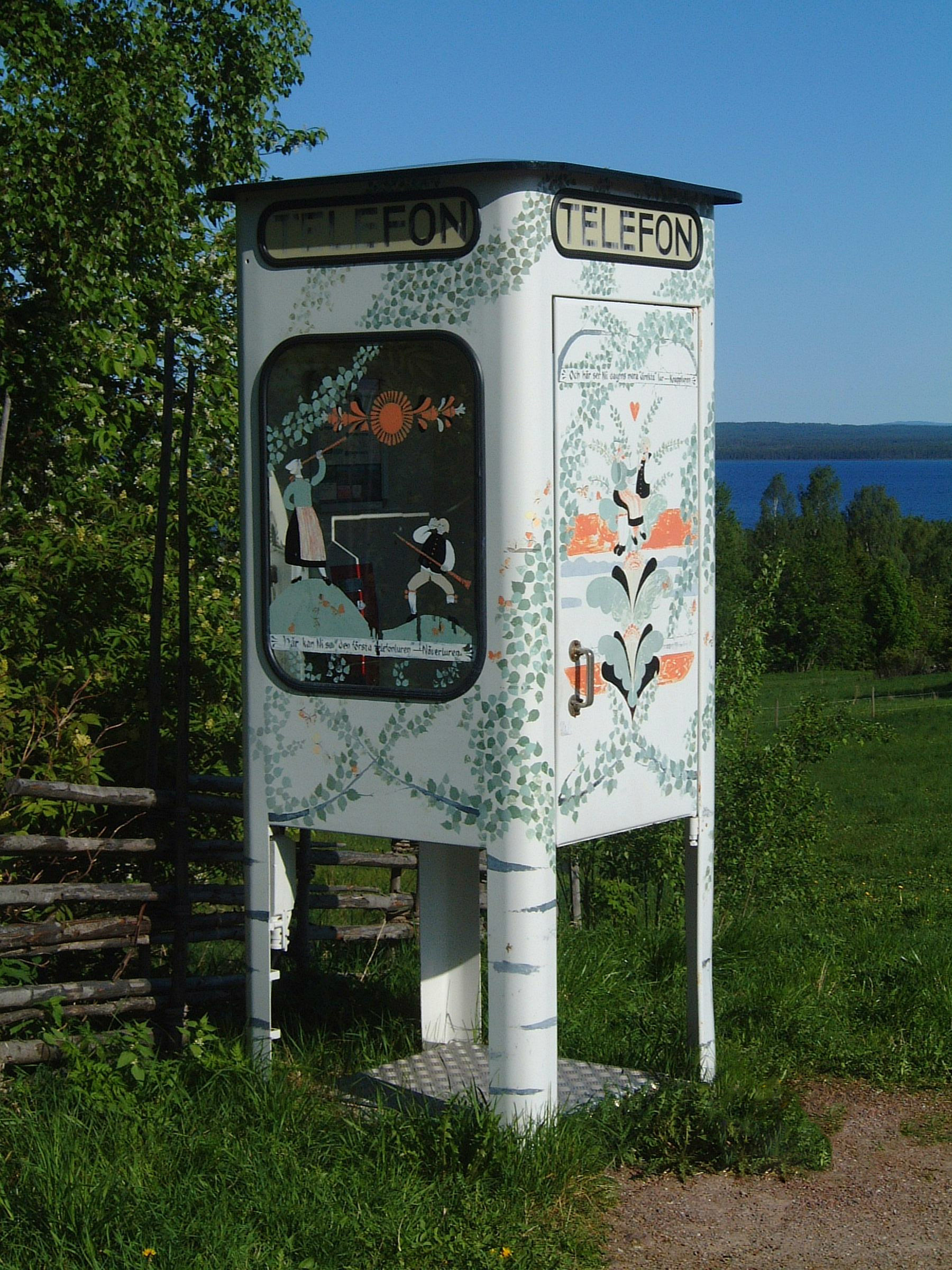 Telefonkiosken, målad av konstnären Lasse Lindqvist